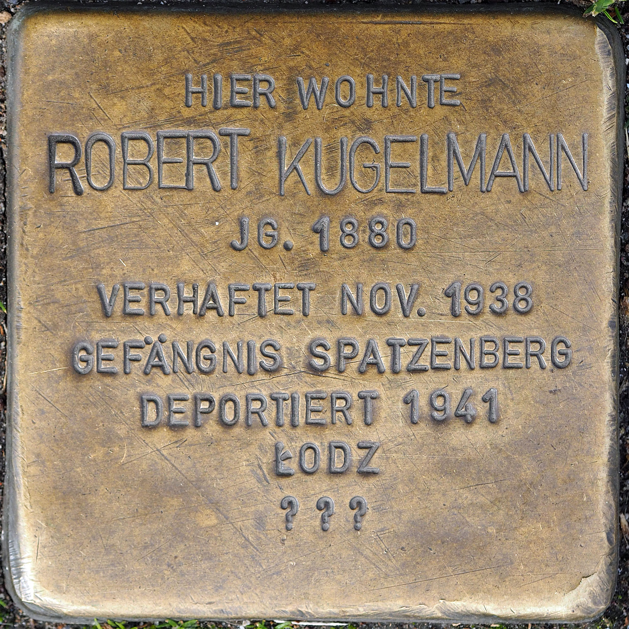 Stolpersteine MG: Kugelmann, Robert